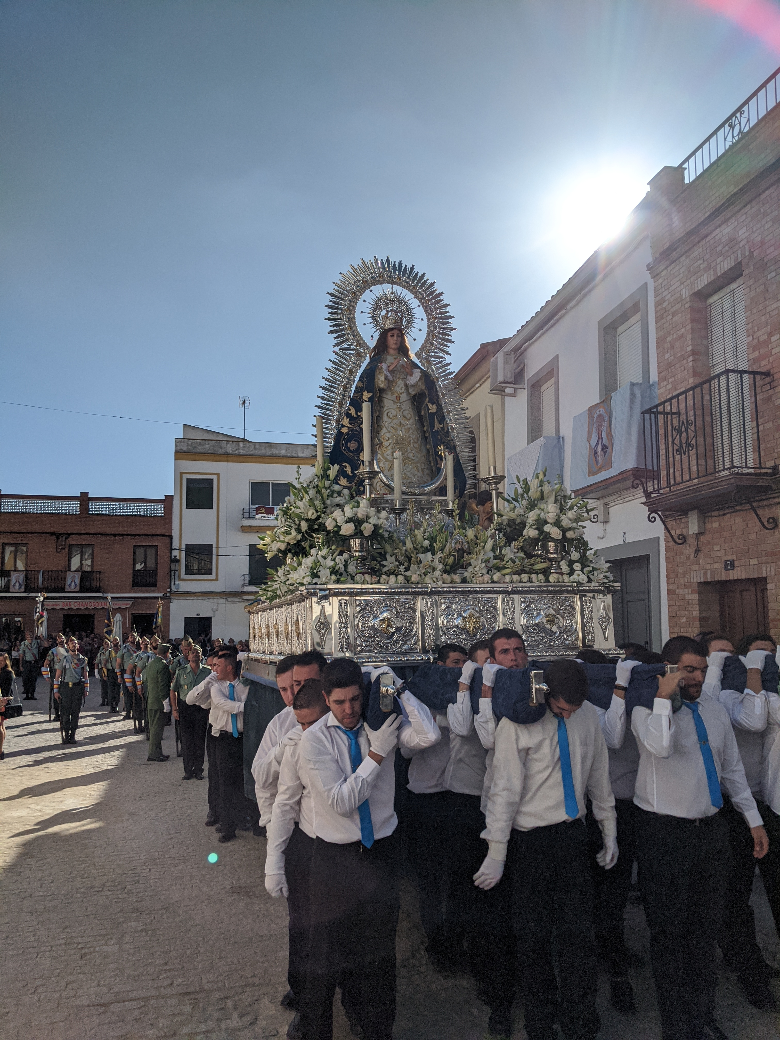 Pura y Limpia